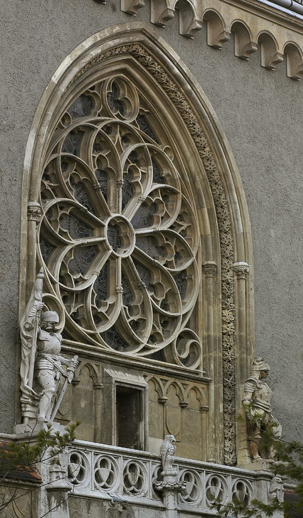 A budapesti Vajdahunyadvár dómhomlokzatán lévő rózsaablak.